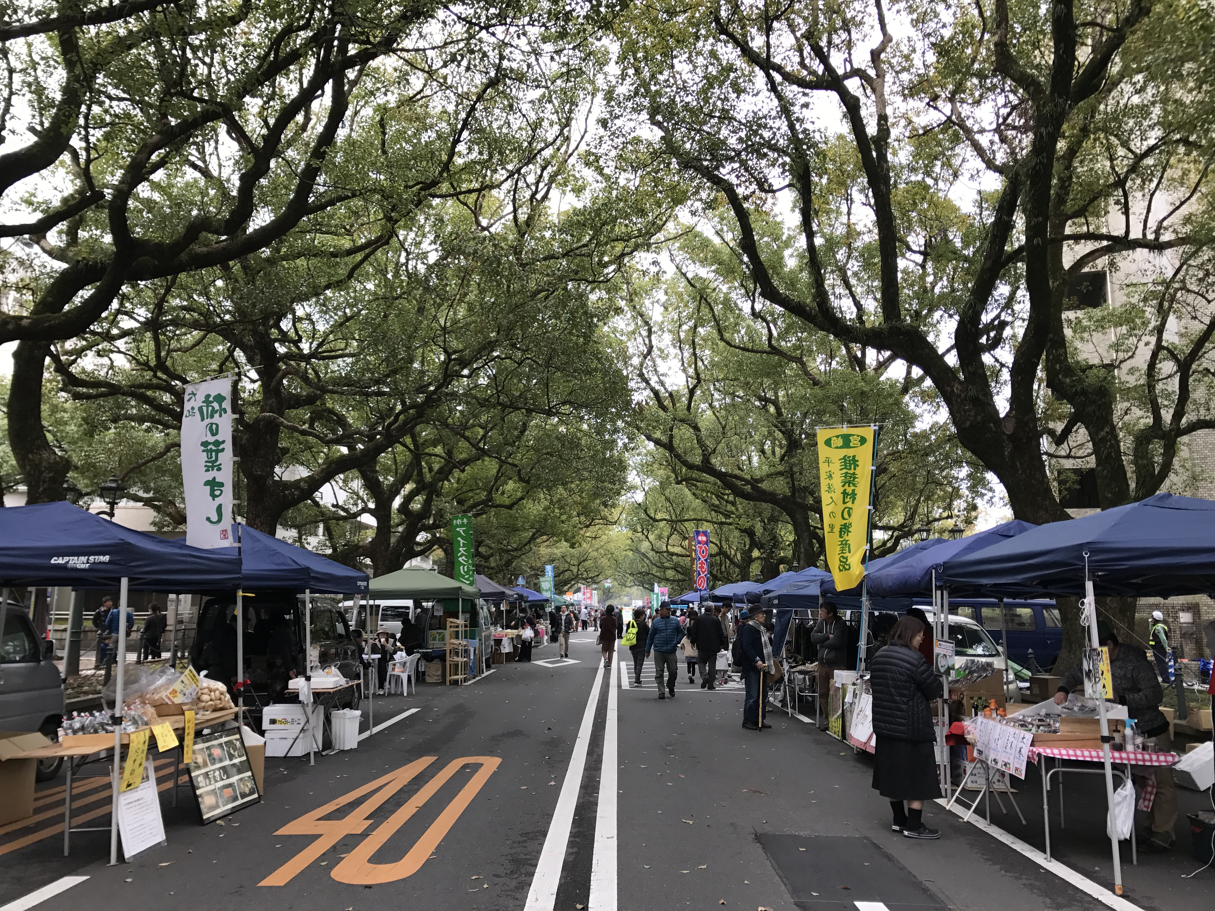 楠並木通りの朝市